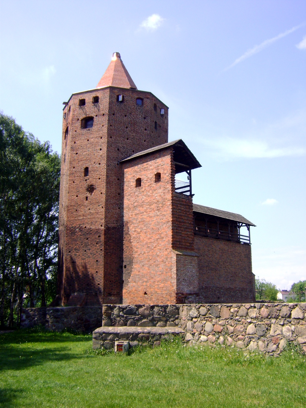 Rawa Mazowiecka - Zamek książąt mazowieckich (ruina), mur., XIV, XVIII, XX (zabytek nr rejestr. 238/784 z 27.12.1967)